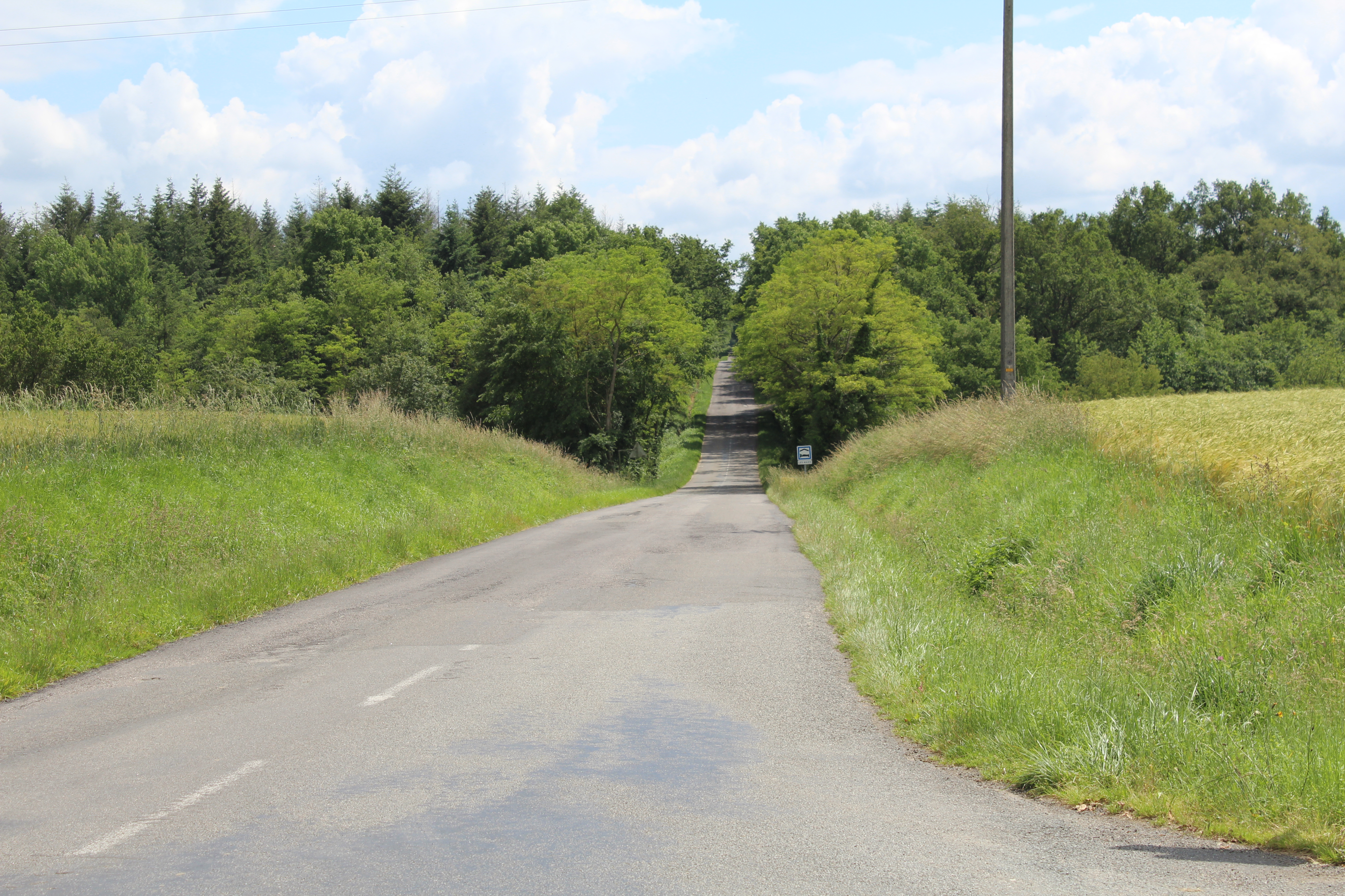 La route départementale à l'entrée dans le Bois de Perrex.